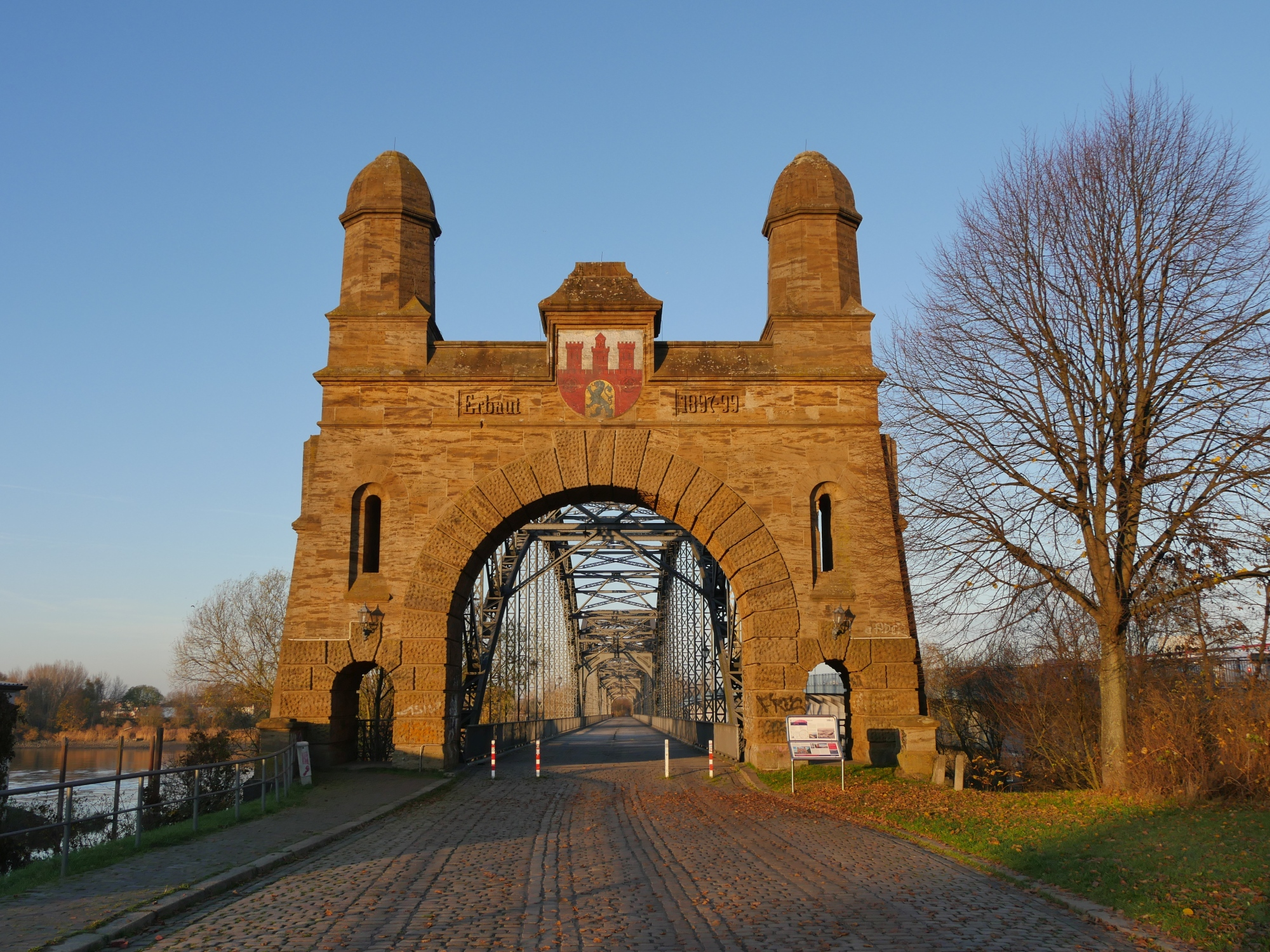 Alte Harburger Elbbrücke, Südportal